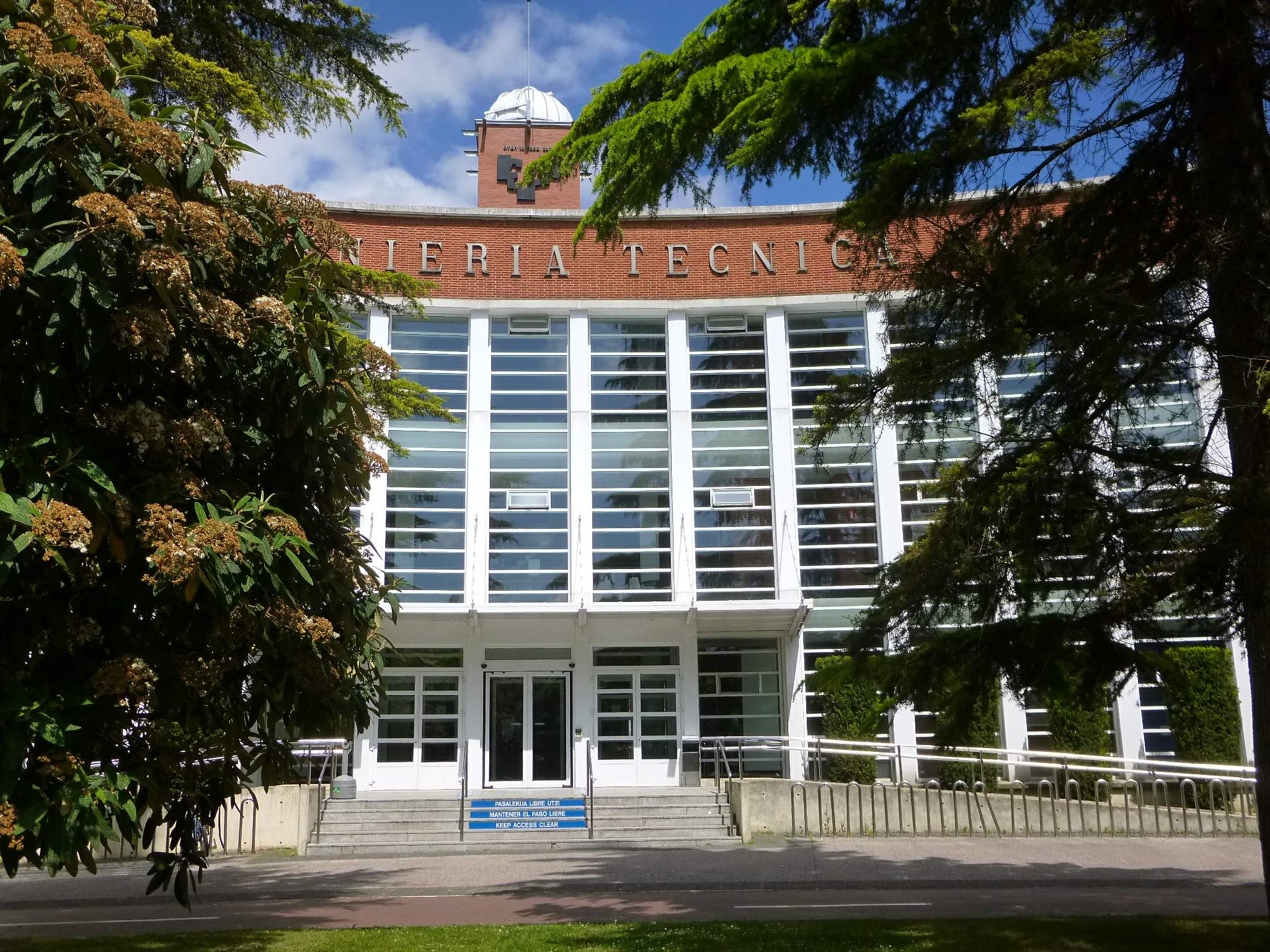 Escuela Universitaria de Ingeniería de Vitoria-Gasteiz, de la UPV-EHU